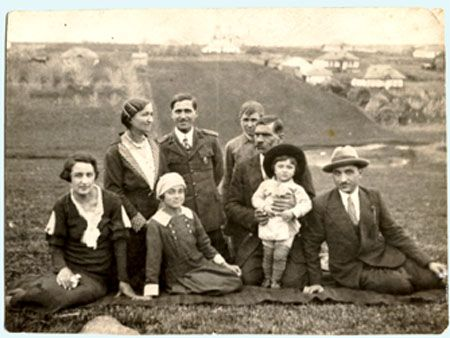 Familie de polonezi în Bălți